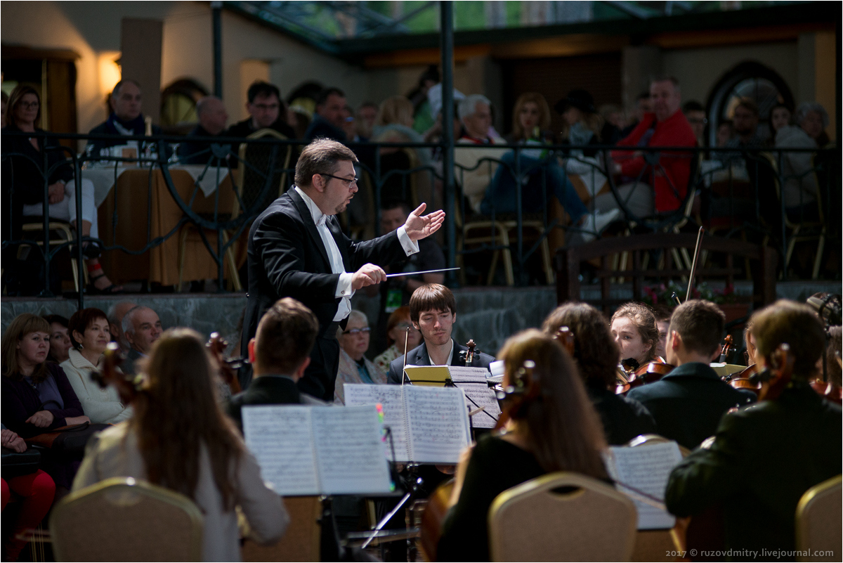 Дирижёр Алим Шахмаметьев на десятом фестивале музыки и искусств "Тремоло", Тольятти, 2017 год